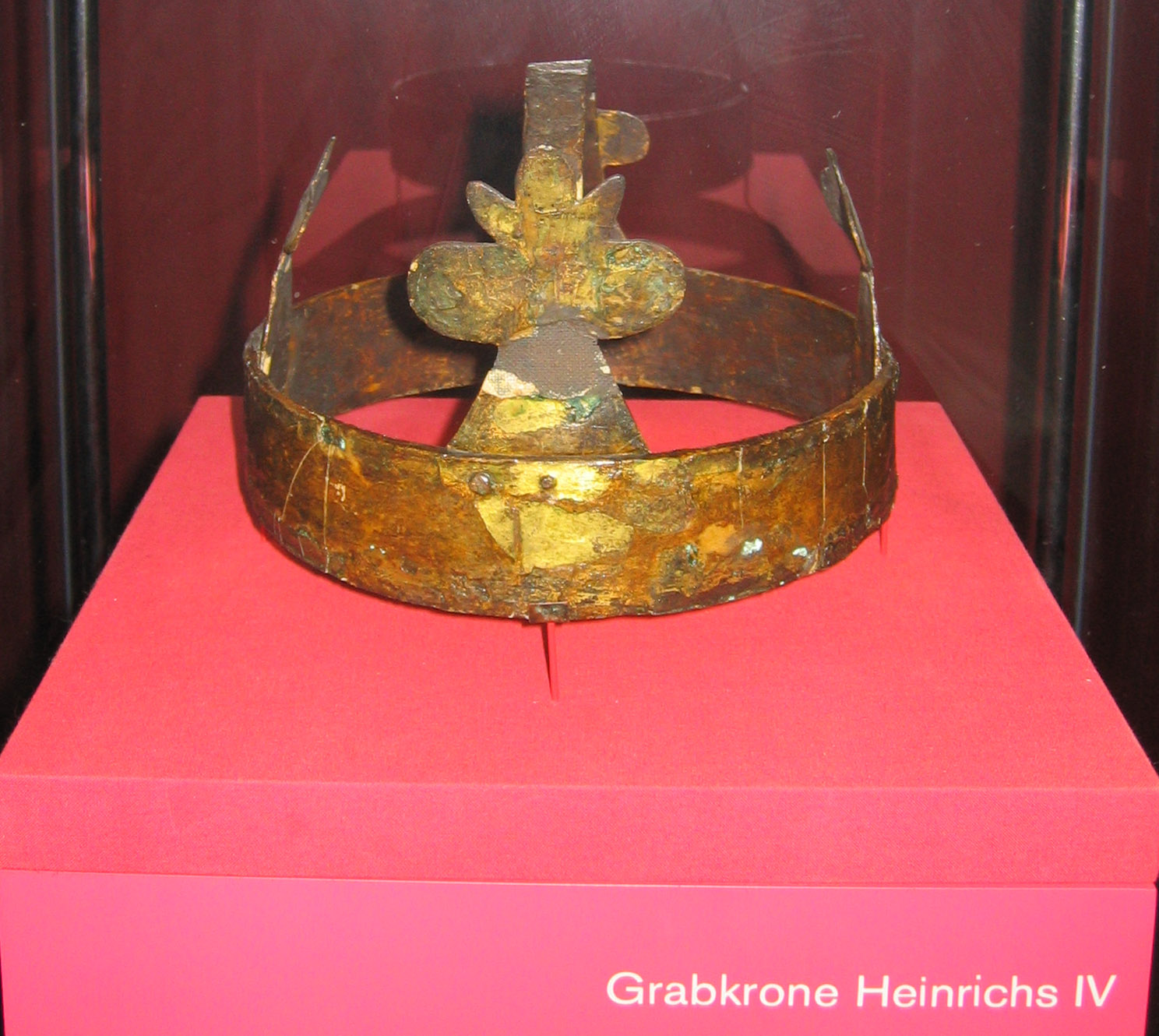 Die Grabkrone Heinrichs IV. Aus der Domschatzkammer des Dom zu Speyer, in dem auch Heinrichs Grabstätte liegt. Aufgenommen am 27.08.2003 ebenda.